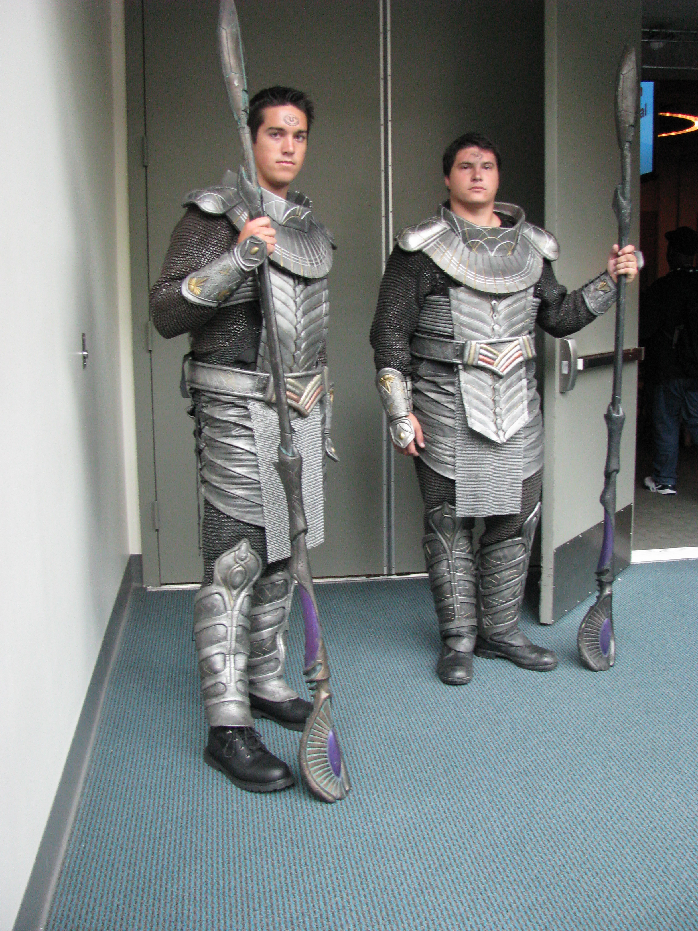 Costumes jaffas au Comic Con en 2008